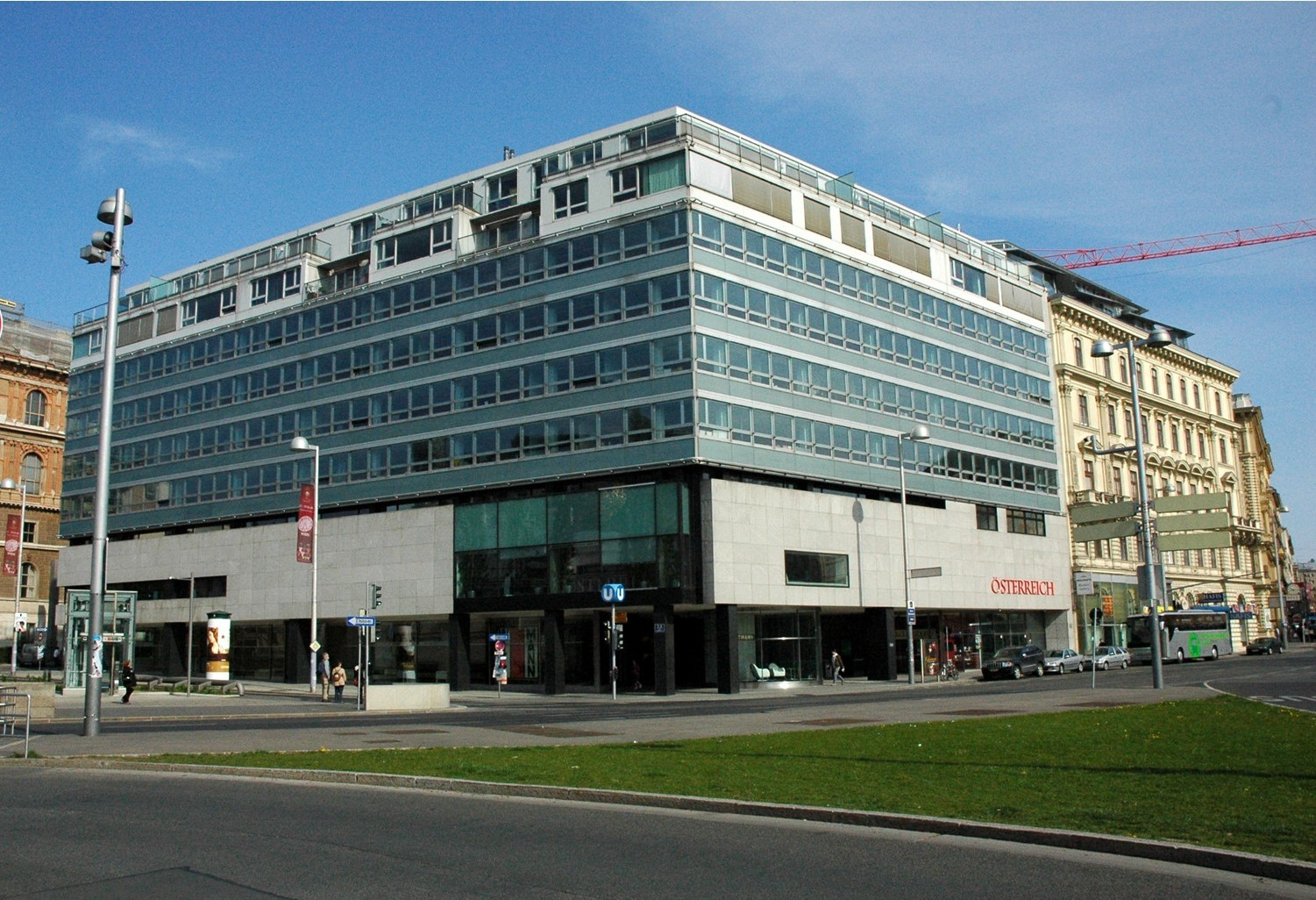 Akademiehof am Karlsplatz, Ecke Operngasse / Getreidemarkt. Redaktionsräume der Tageszeitung Österreich